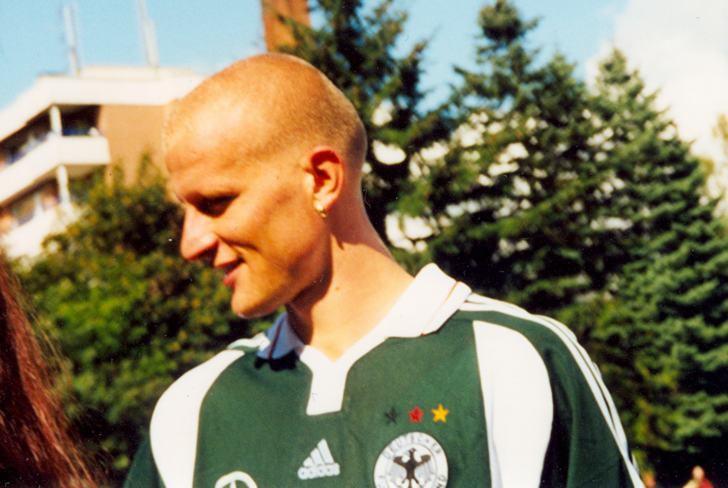 Carsten Jancker im Jahr 2000 in Reinbek vor dem WM-Qualifikationsspiel Deutschland gegen Griechenland.